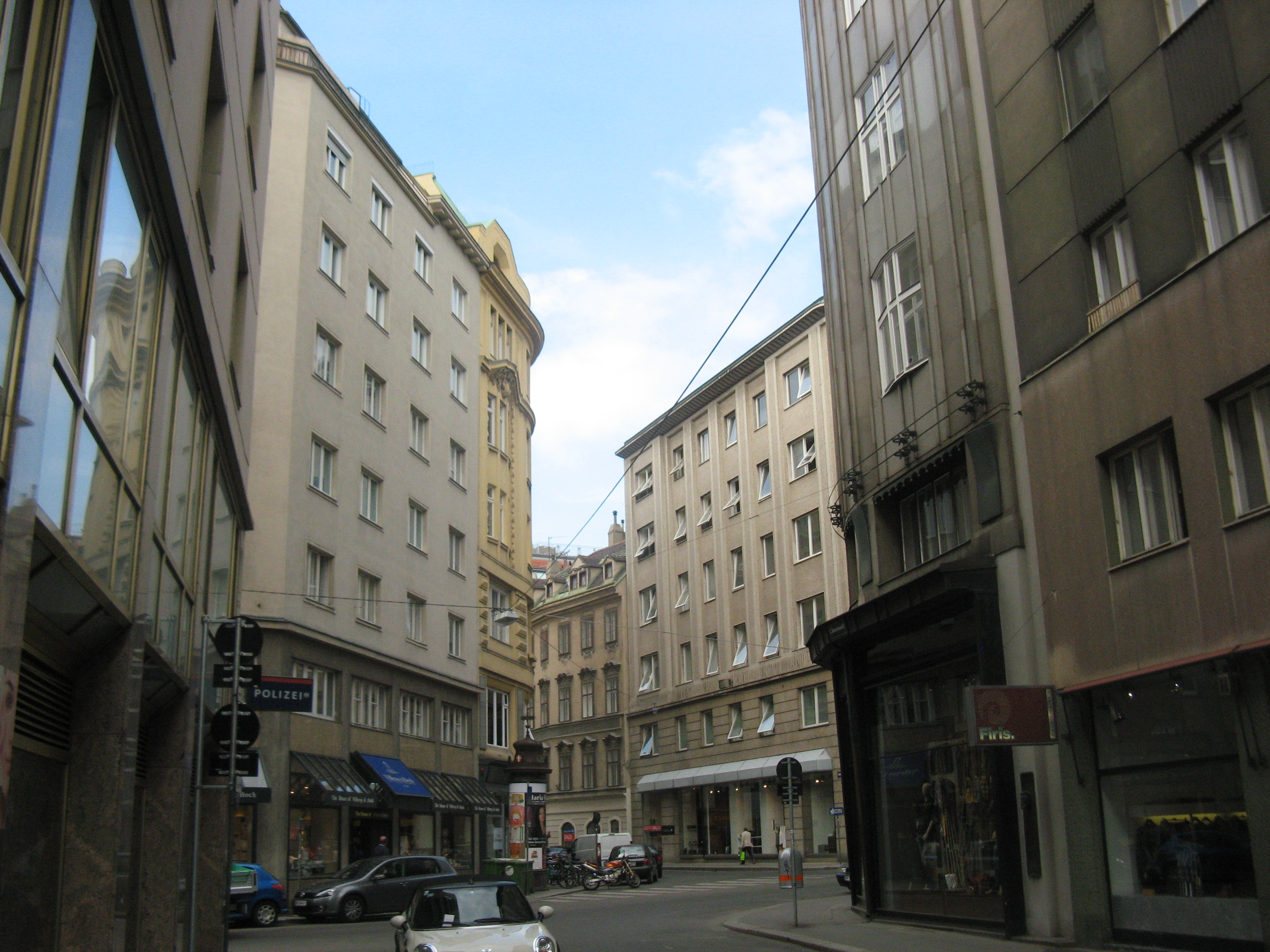 Bauernmarkt gegen Brandstätte nach Süden, Wien-Innere Stadt